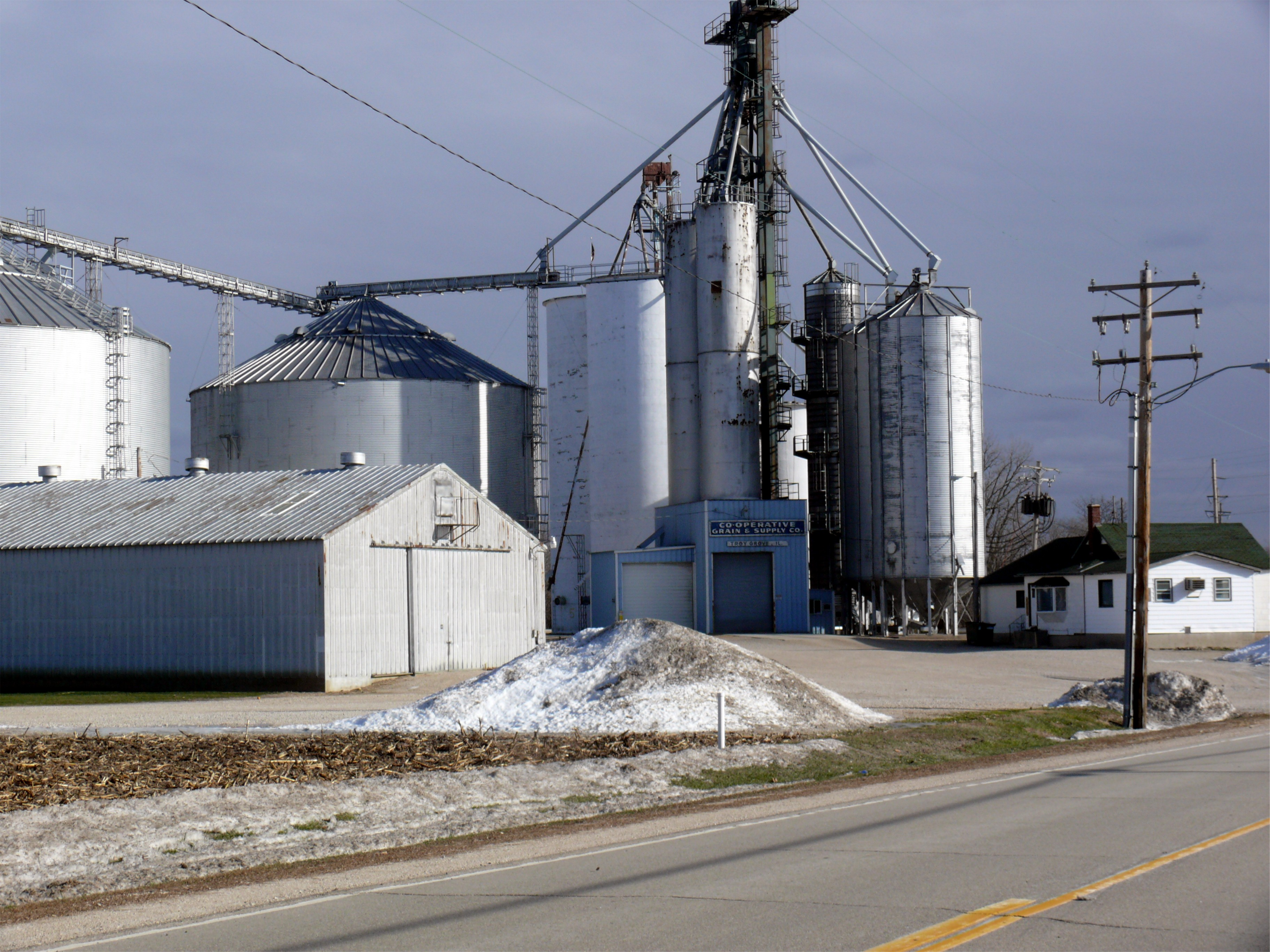 Grain elevator in Troy Grove, Illinois